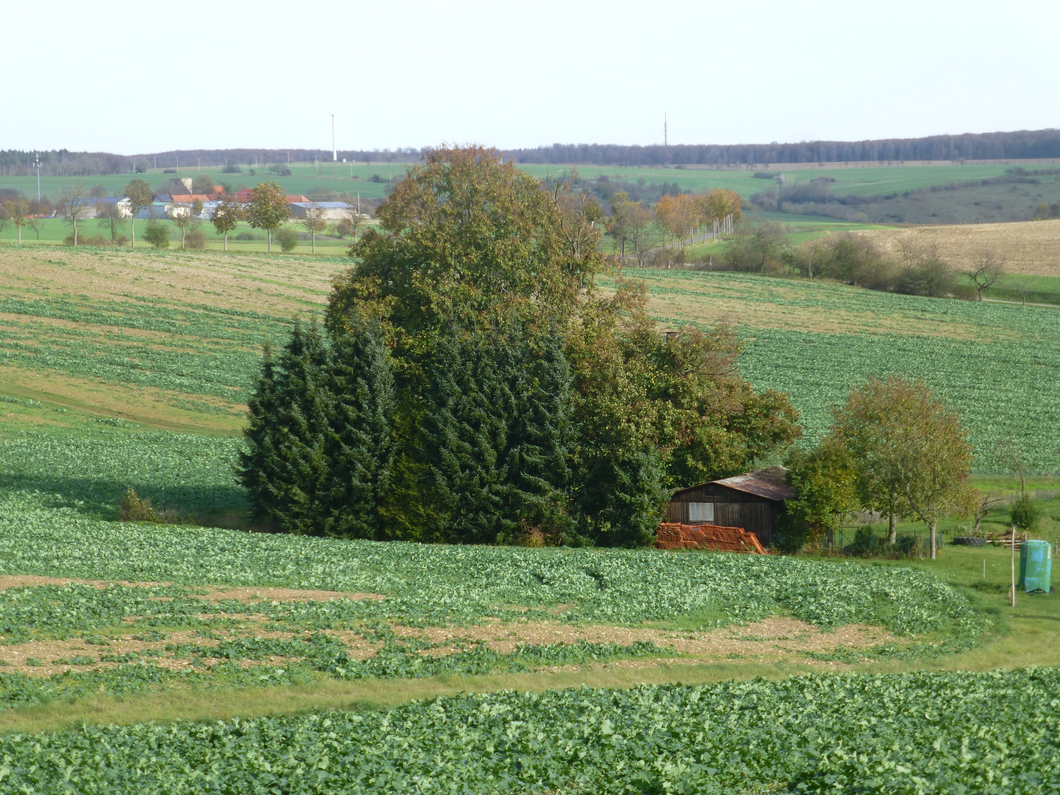 Blick zu ehemaligen Gut Scharfloh